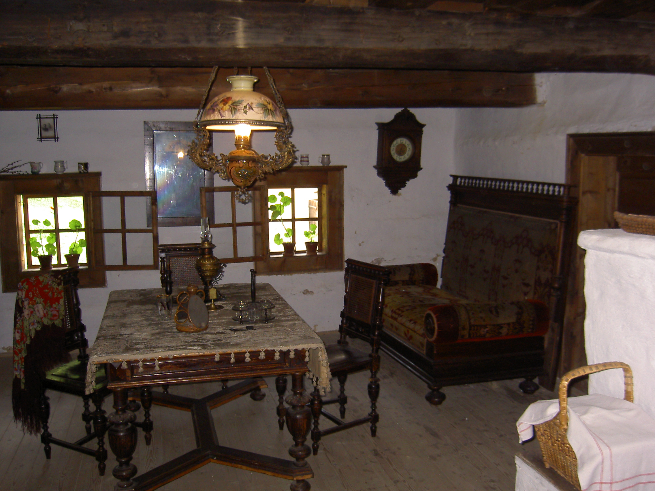 Múzeum oravskej dediny Zuberec - Brestová